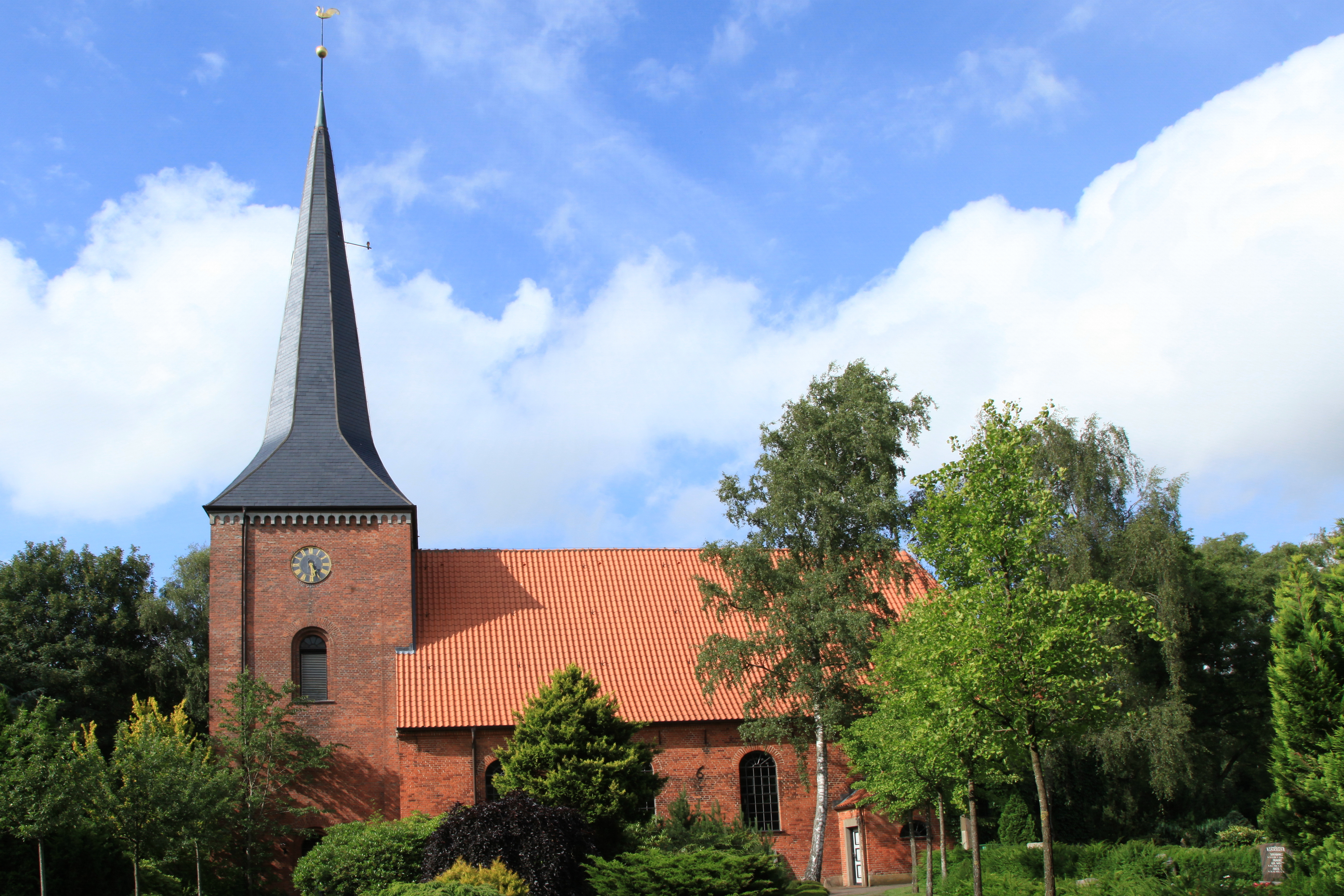 Marienkirche, Hauptstraße in Hohn